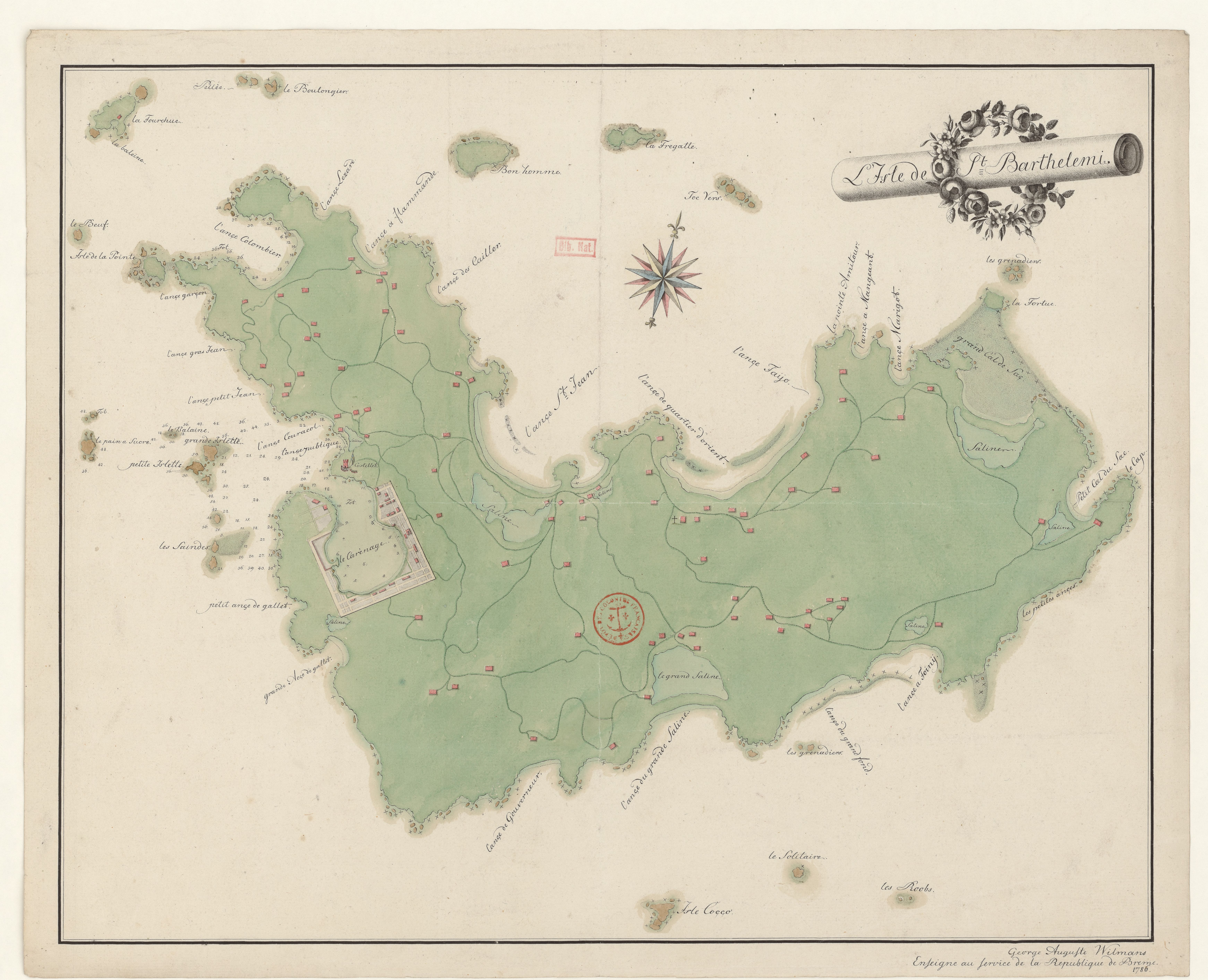 Old map of St. Barthélemy island, Caribbean